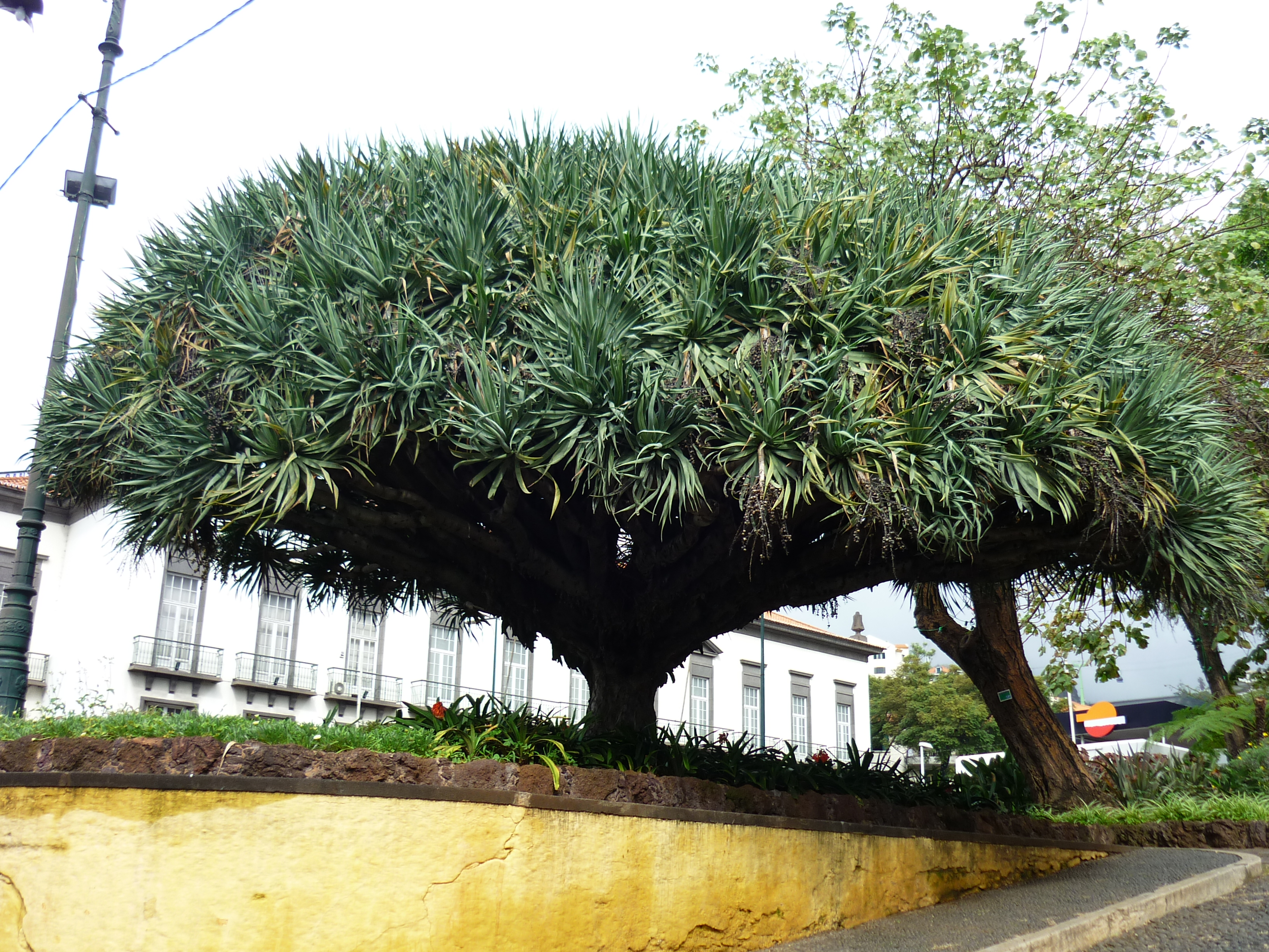 Sárkányvérfa (Dracaena draco) Funchalban (Madeira)